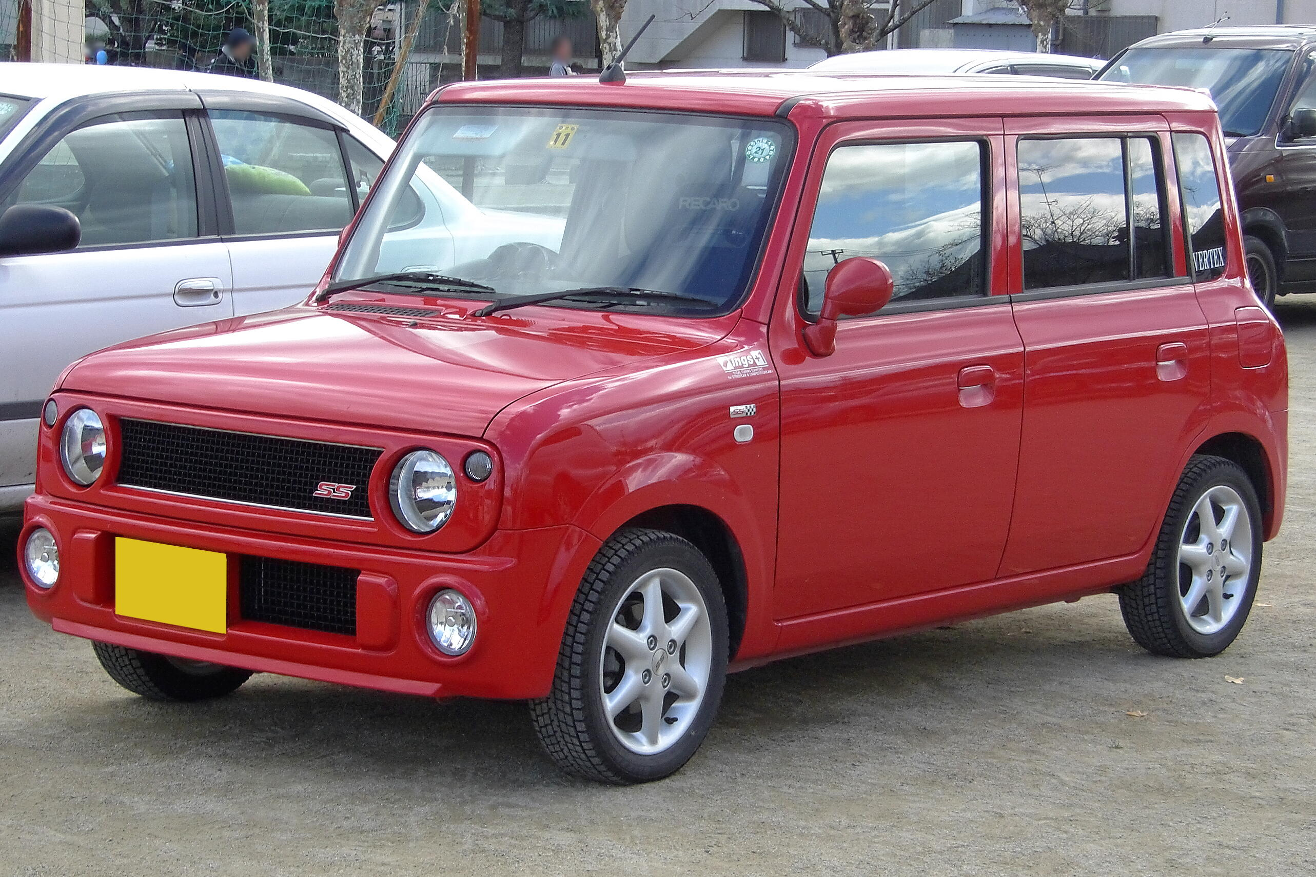 スズキ・アルトラパンSS